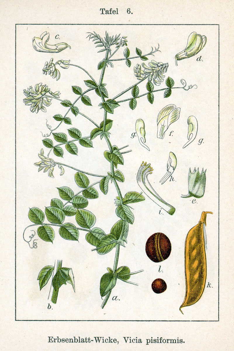 Vicia pisiformis L. Original Description Erbsenblatt-Wicke, Vicia pisiformis